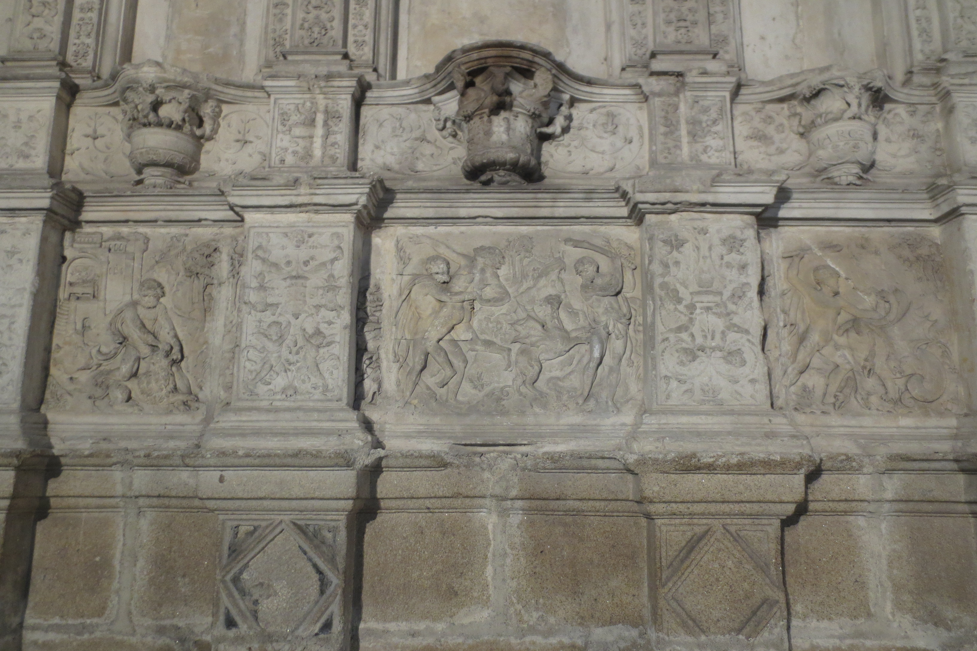 Frise de reliefs sur la partie basse du jubé. Scènes non identifiées, associées aux travaux d'Hercule.